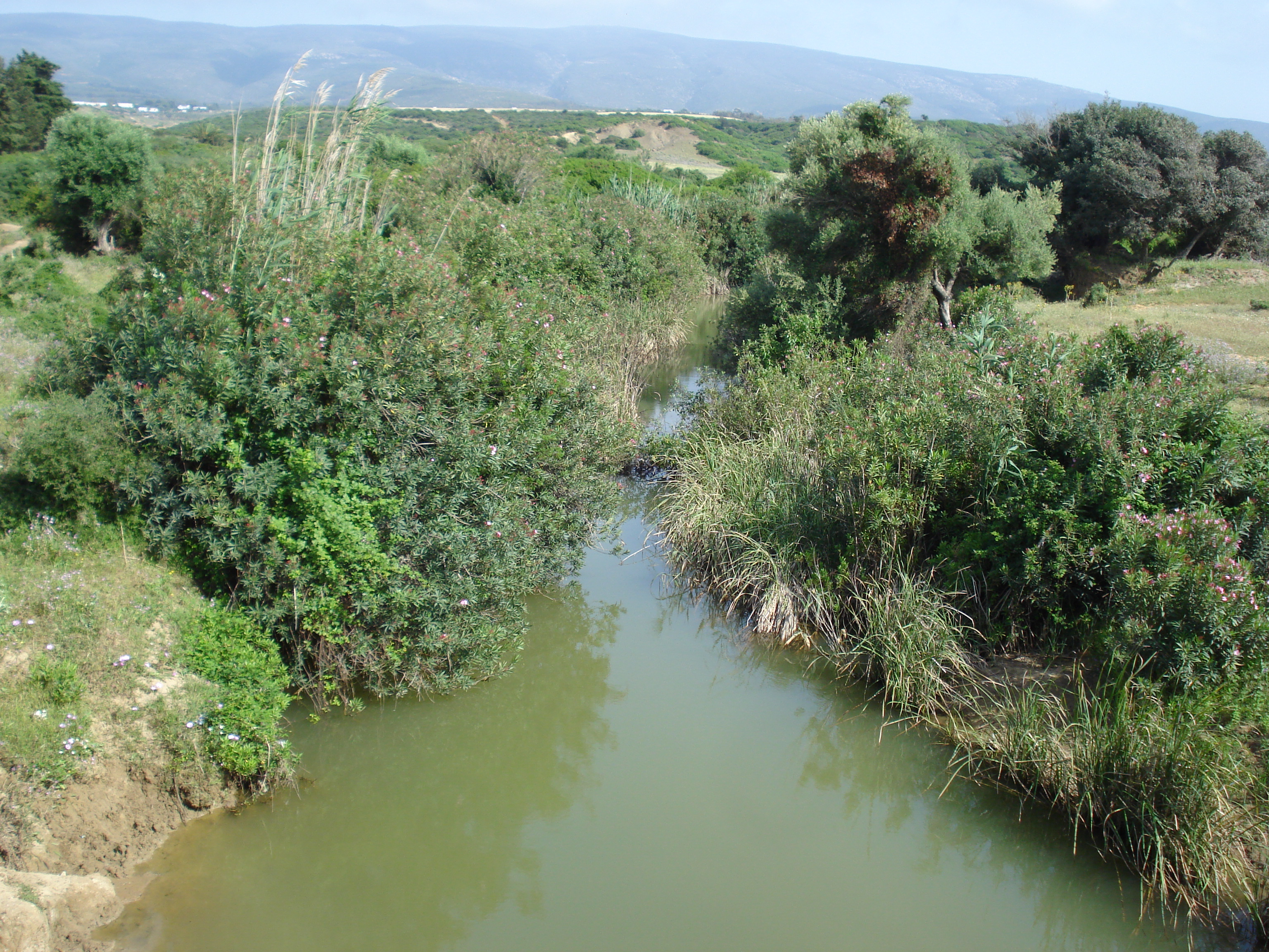 وادي العبيد على مستوى الطريق الجهوية رقم 26، الوطن القبلي، تونس